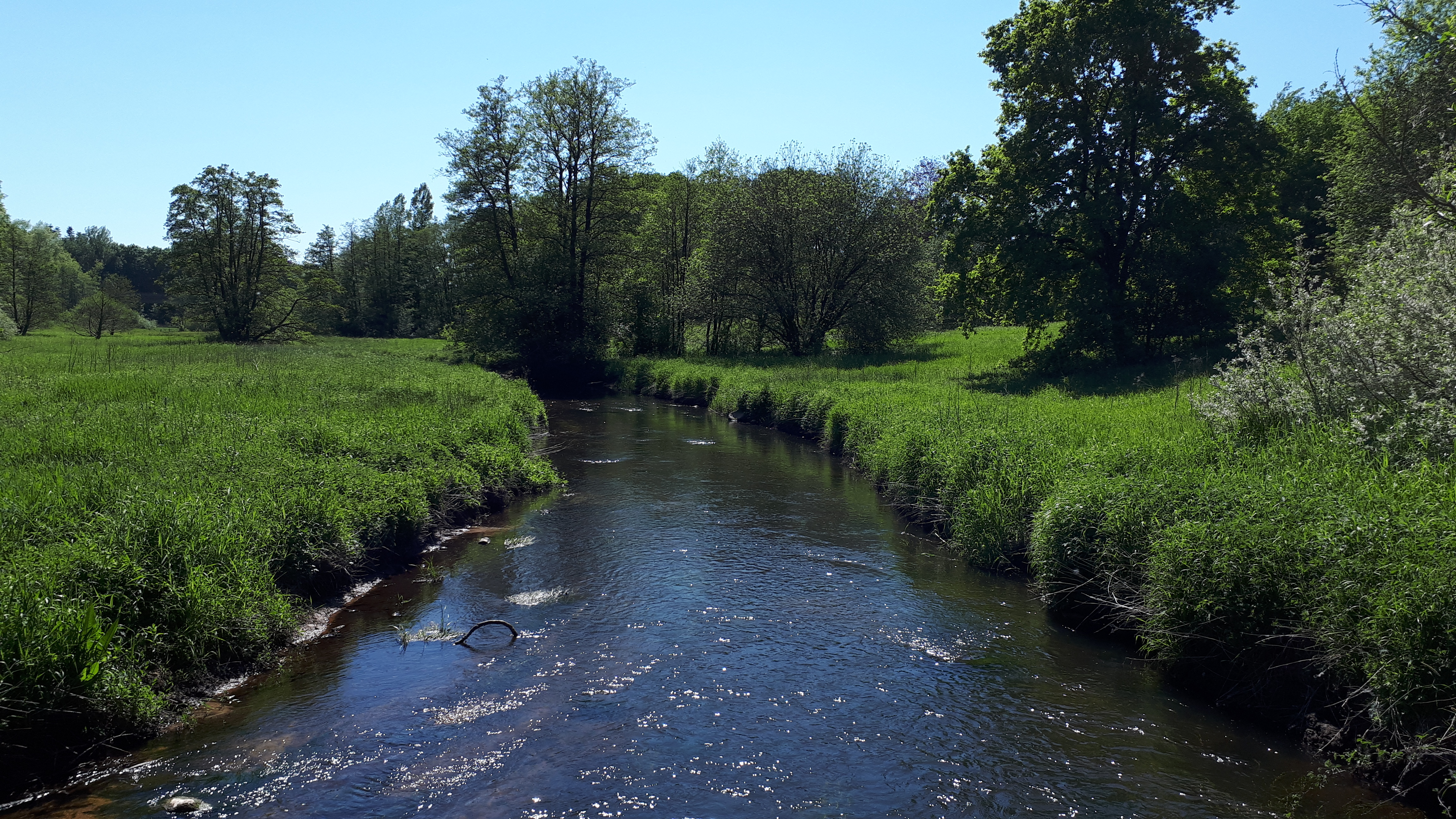 Treene bei Tarp